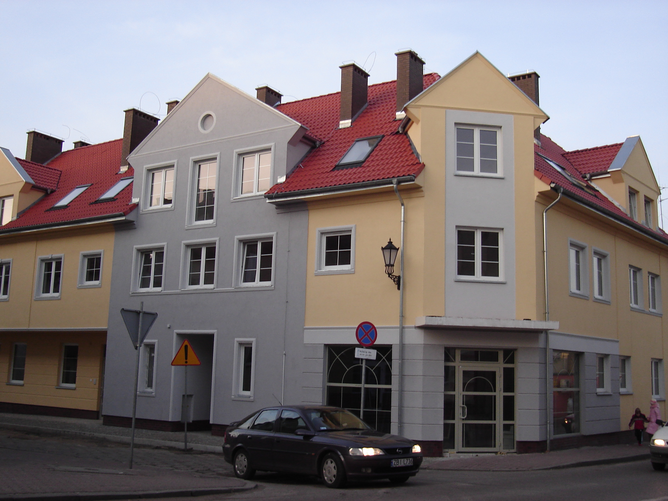 Nowy budynek TBS przy ul. Koszalińskiej; autor zdjęcia Uczeń; 15.02.2007 r.